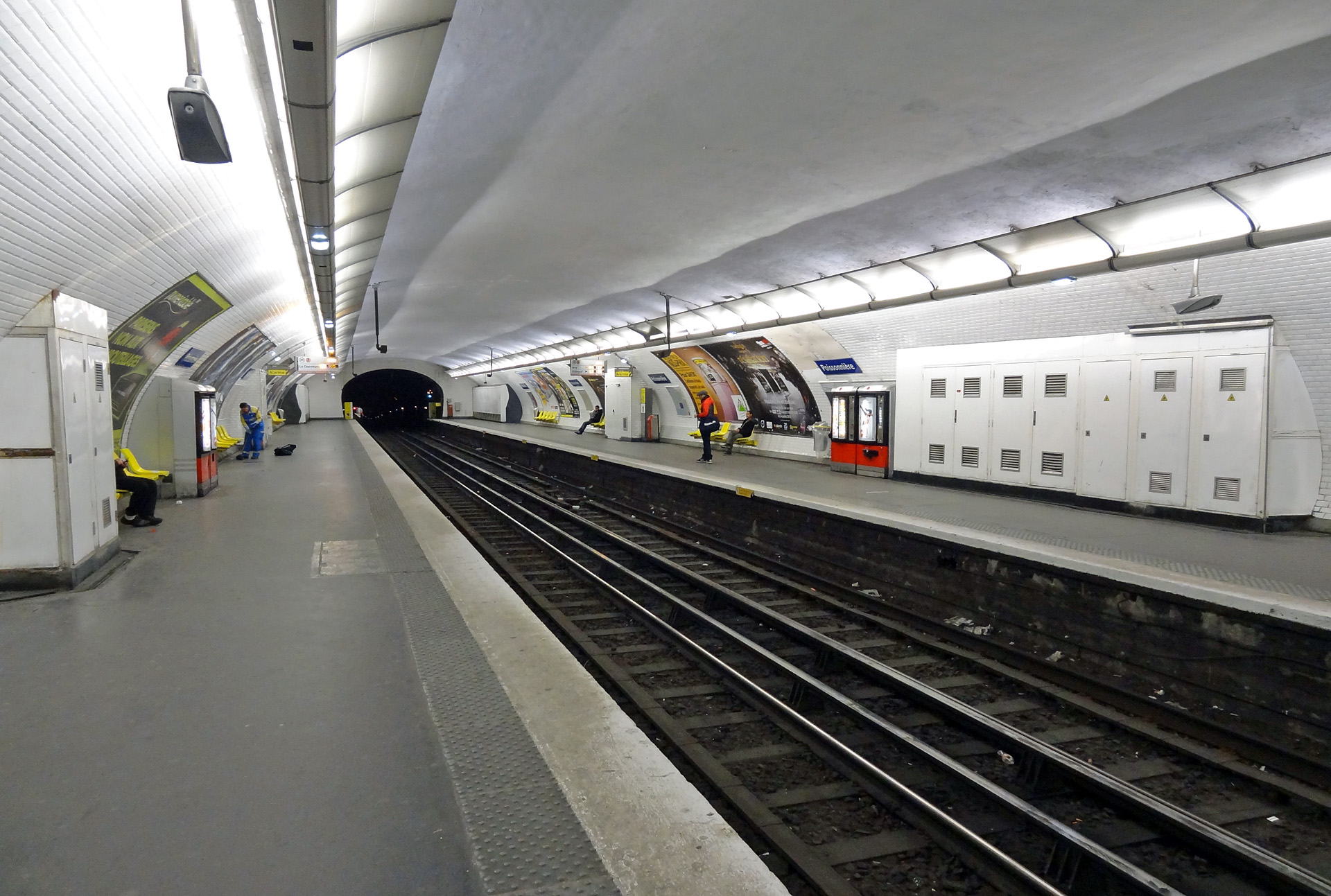 Station Poissonnière de la ligne 7 du métro de Paris, France.